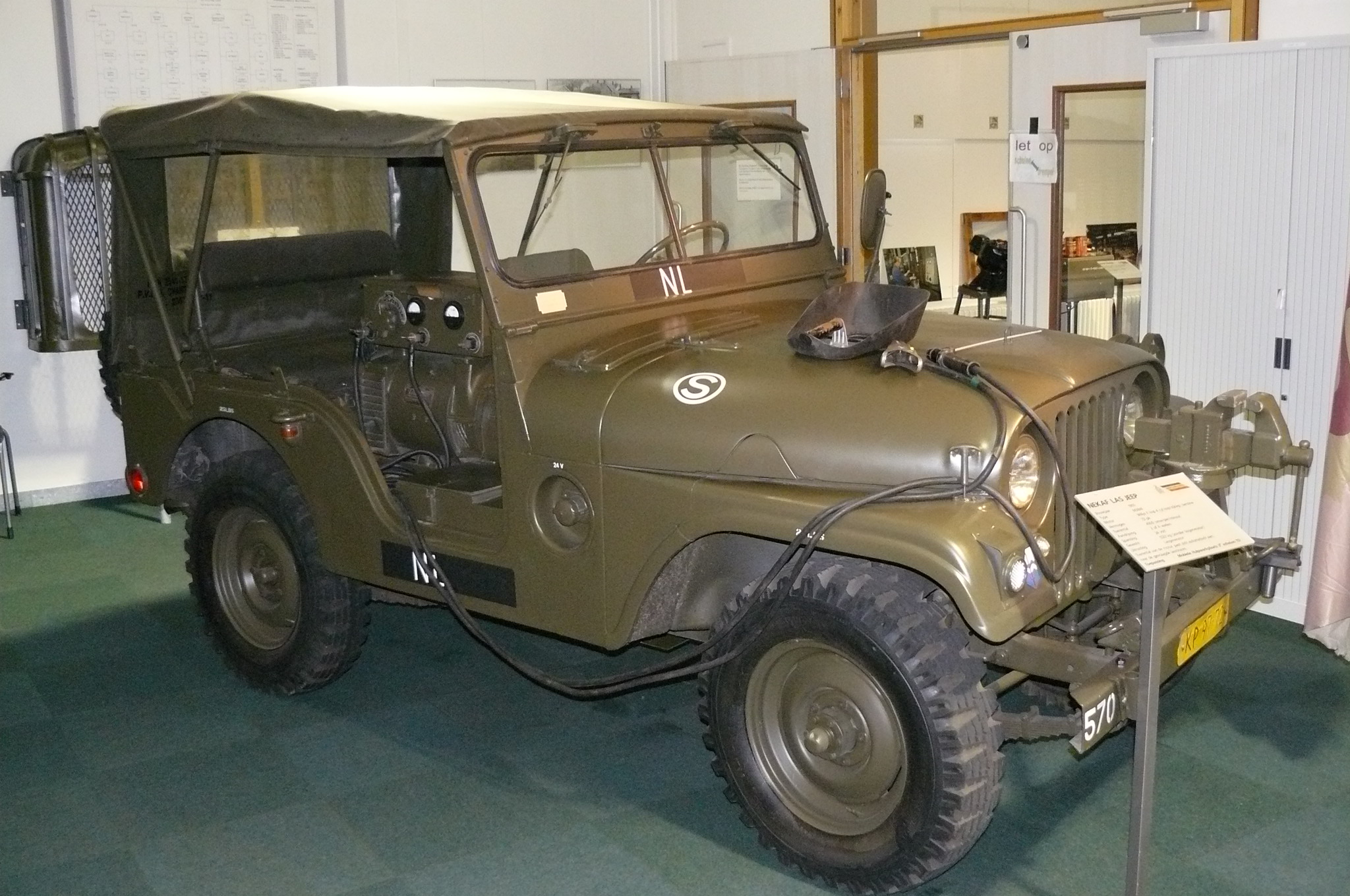 Nekaf jeep van de militaire Technische Dienst, uitgerust met stroom aggregaat. In museum van de Technische Dienst in Kamp Soesterberg